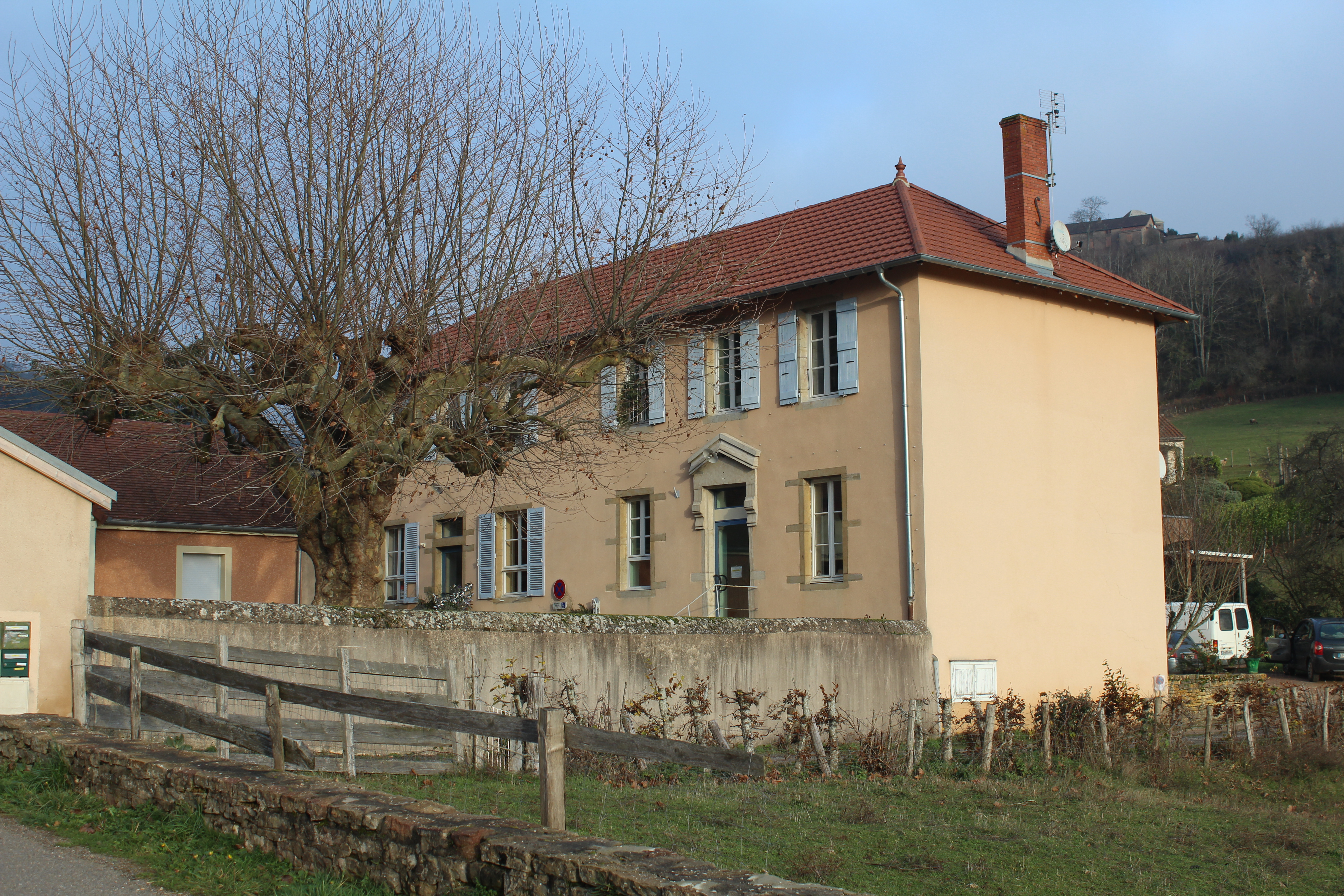 Mairie de Château, Saône-et-Loire.